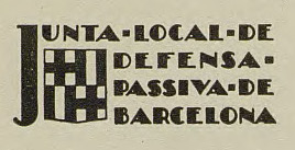 Logotip de la Secretaria General de la Junta Local de Defensa Passiva de Barcelona. Juny de 1938